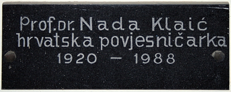 Grob Nade Klaić na Mirogoju u Zagrebu